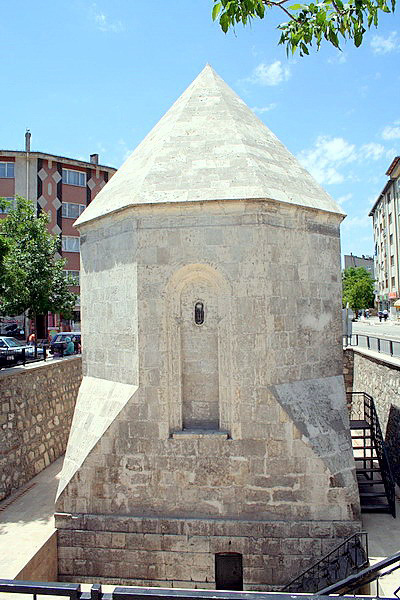 Ahi Emir Ahmet Türbesi, Sivas, Turkey